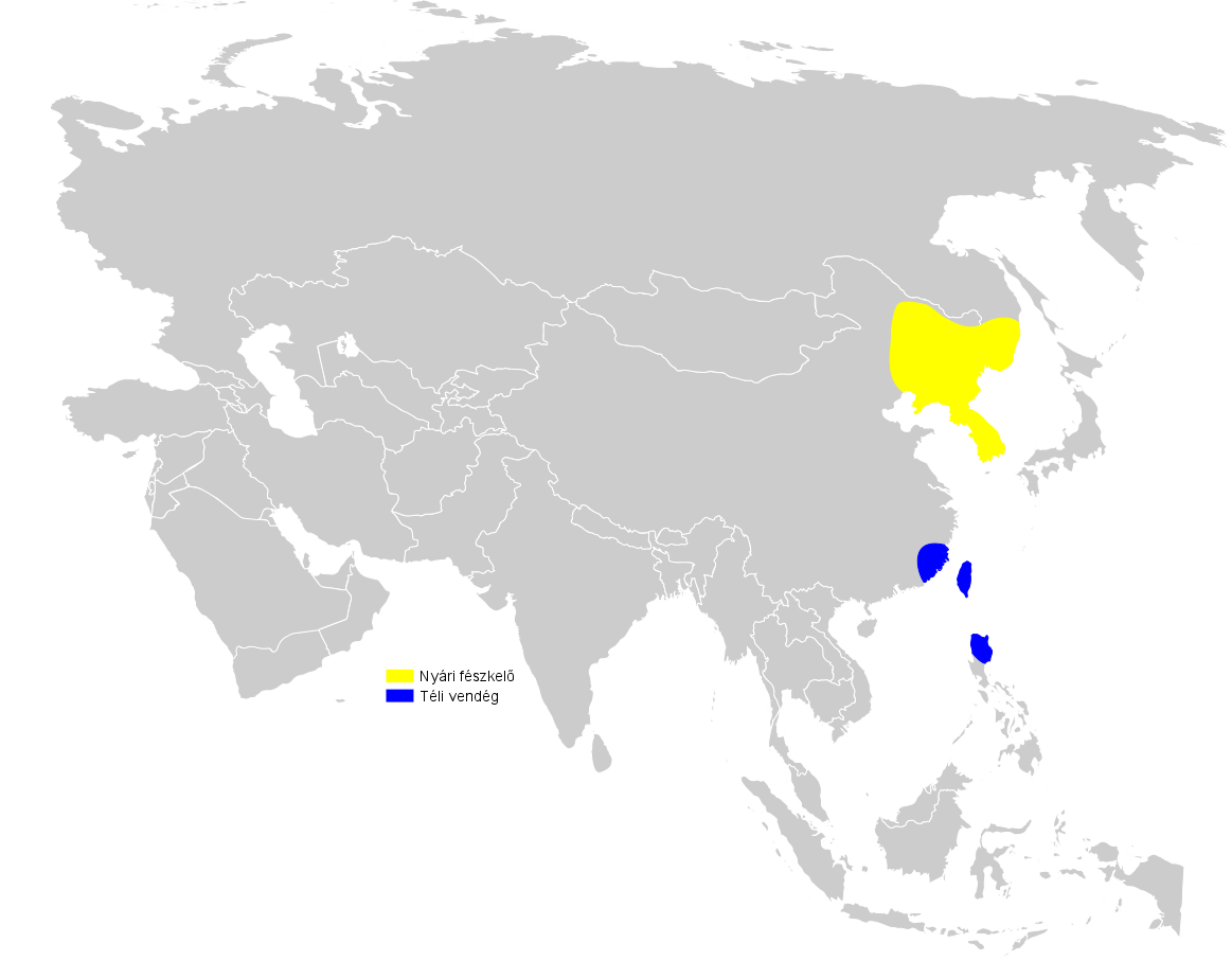 Horornis borealis distribution map. based on